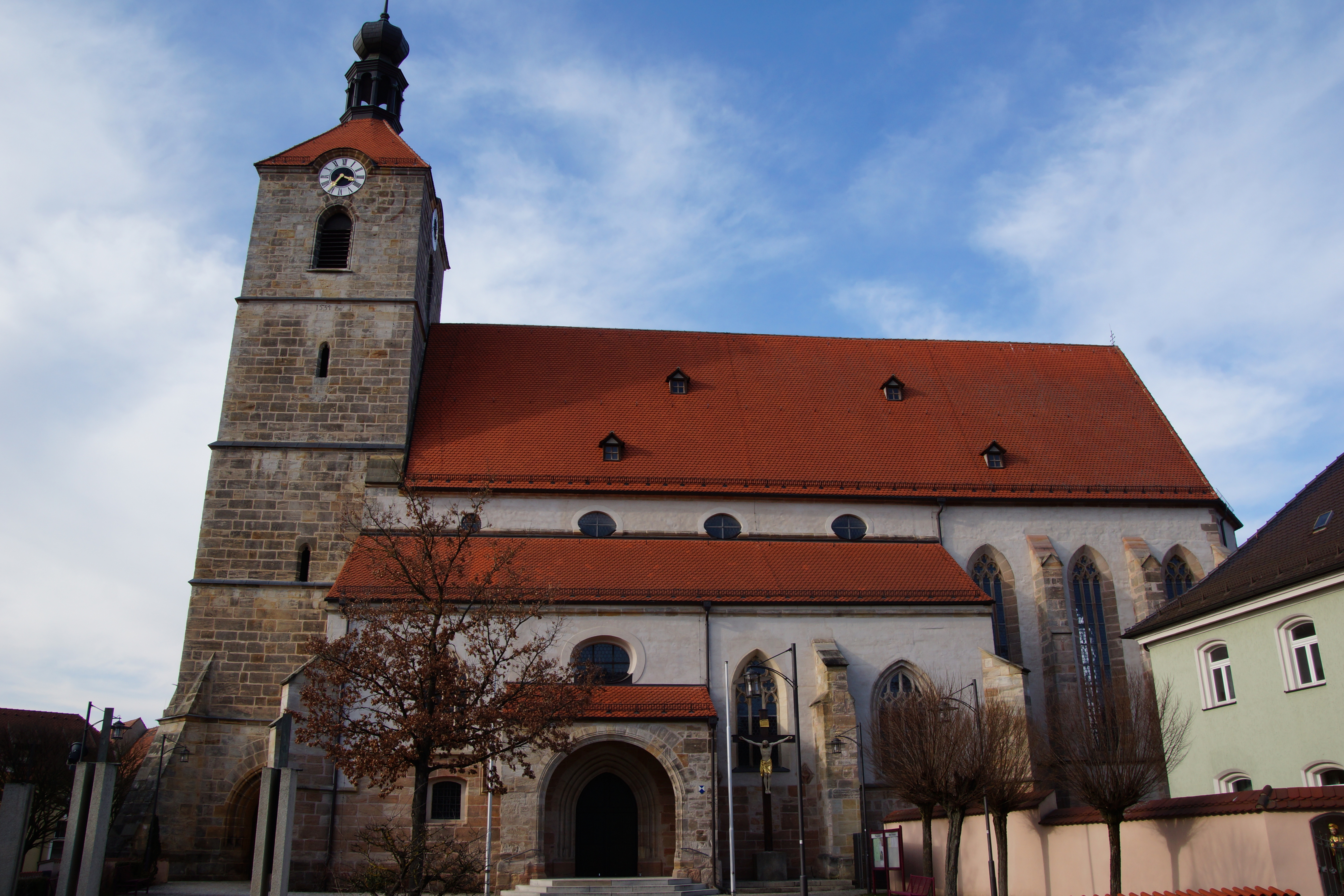 Die katholische Pfarrkirche St. Jakobus in Hahnbach in der Oberpfalz